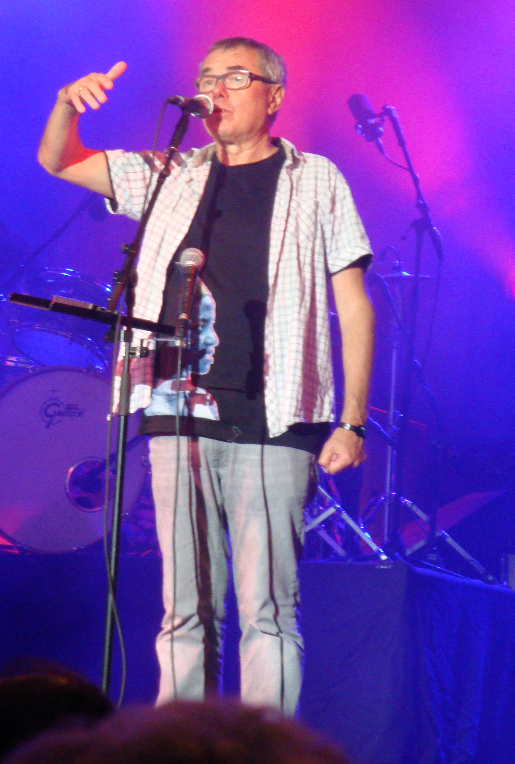 Christian Mousset le Dimanche 24 Mai 2015 lors de la dernière soirée de l'édition 2015 (40ème édition) de Musiques Métisses à Angoulème.